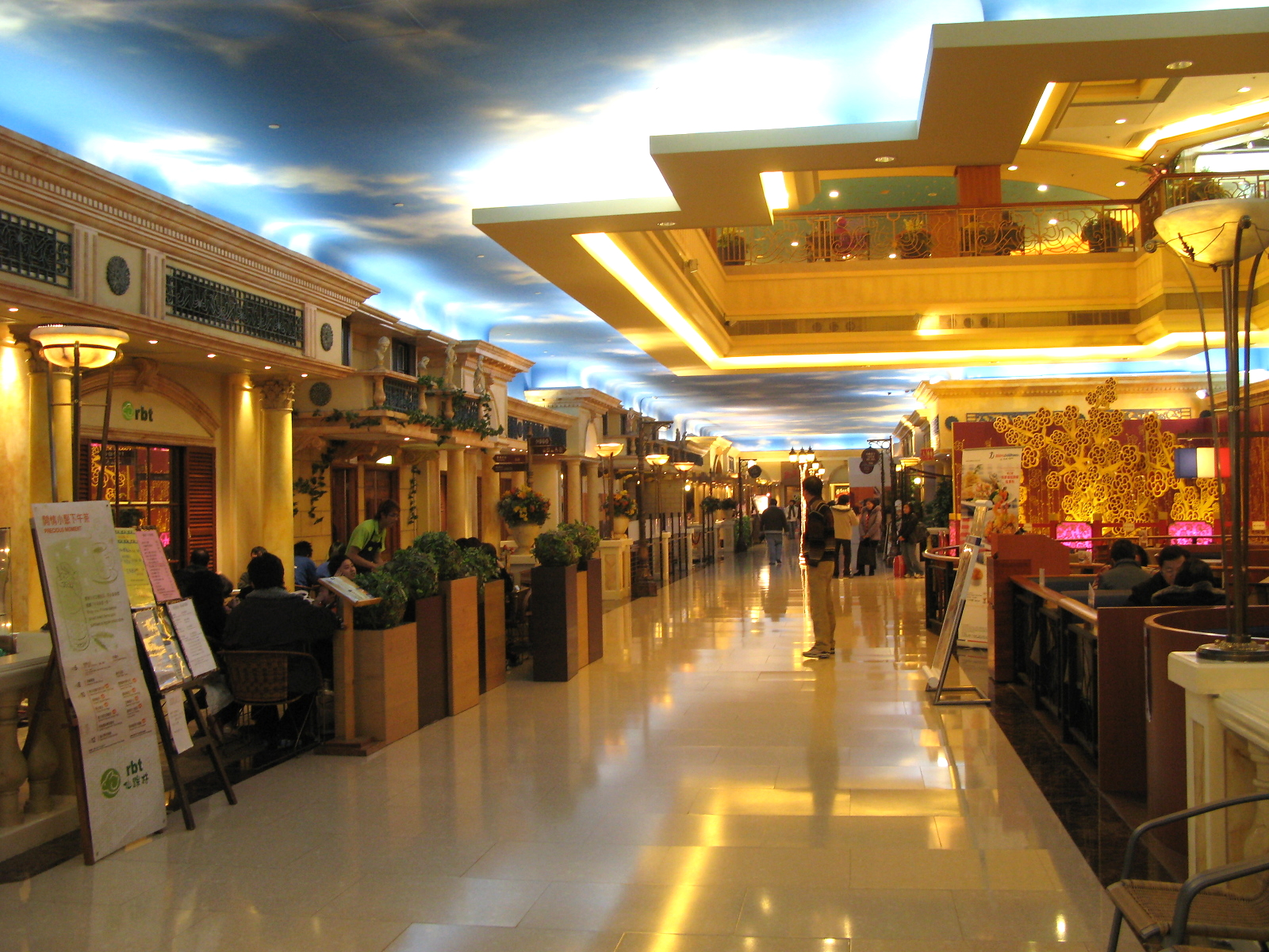 HK Paradise Mall Diners Delight